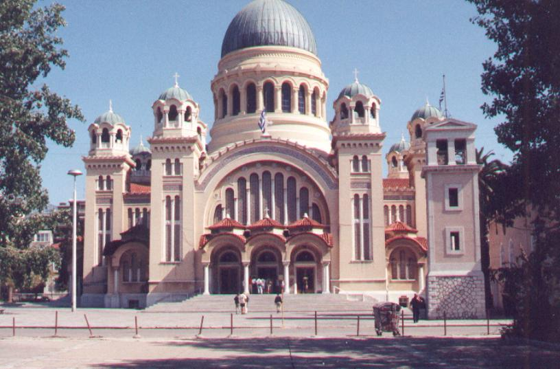 Kathedraal in Patras